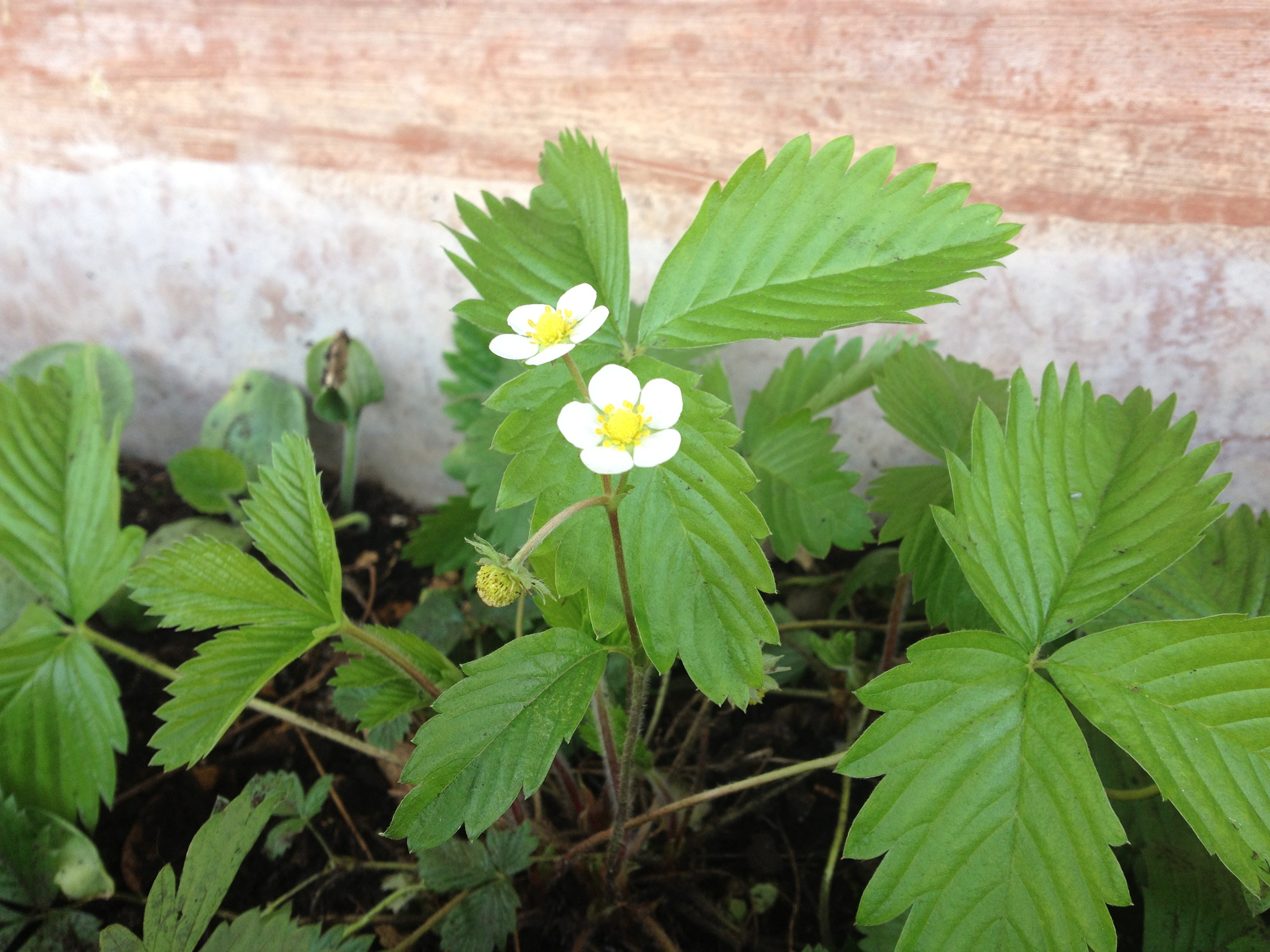 fiori di fragola